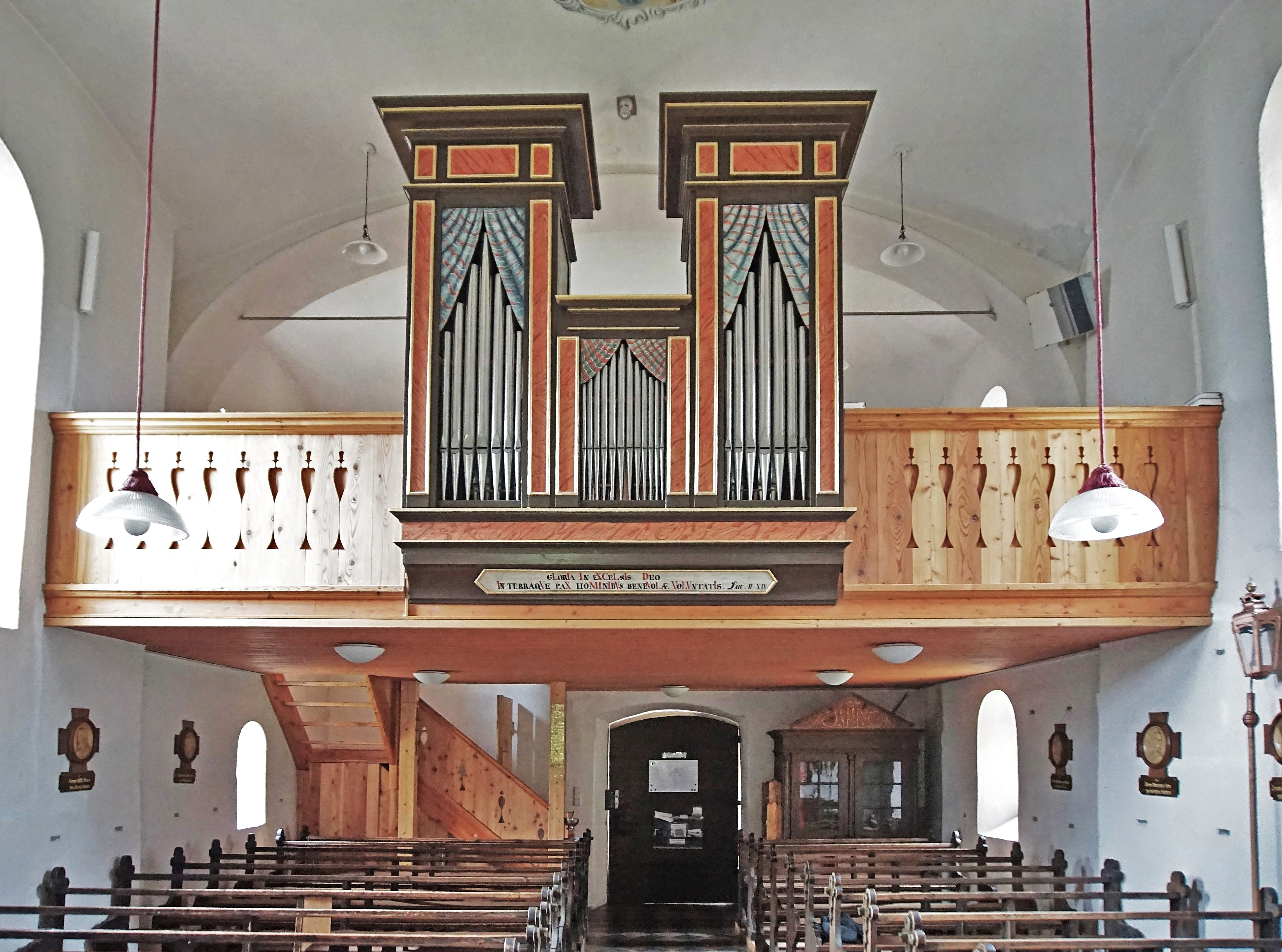 Kath. Pfarrkirche Hl. Johannes der Täufer in Kaning (Radenthein), die Orgelempore